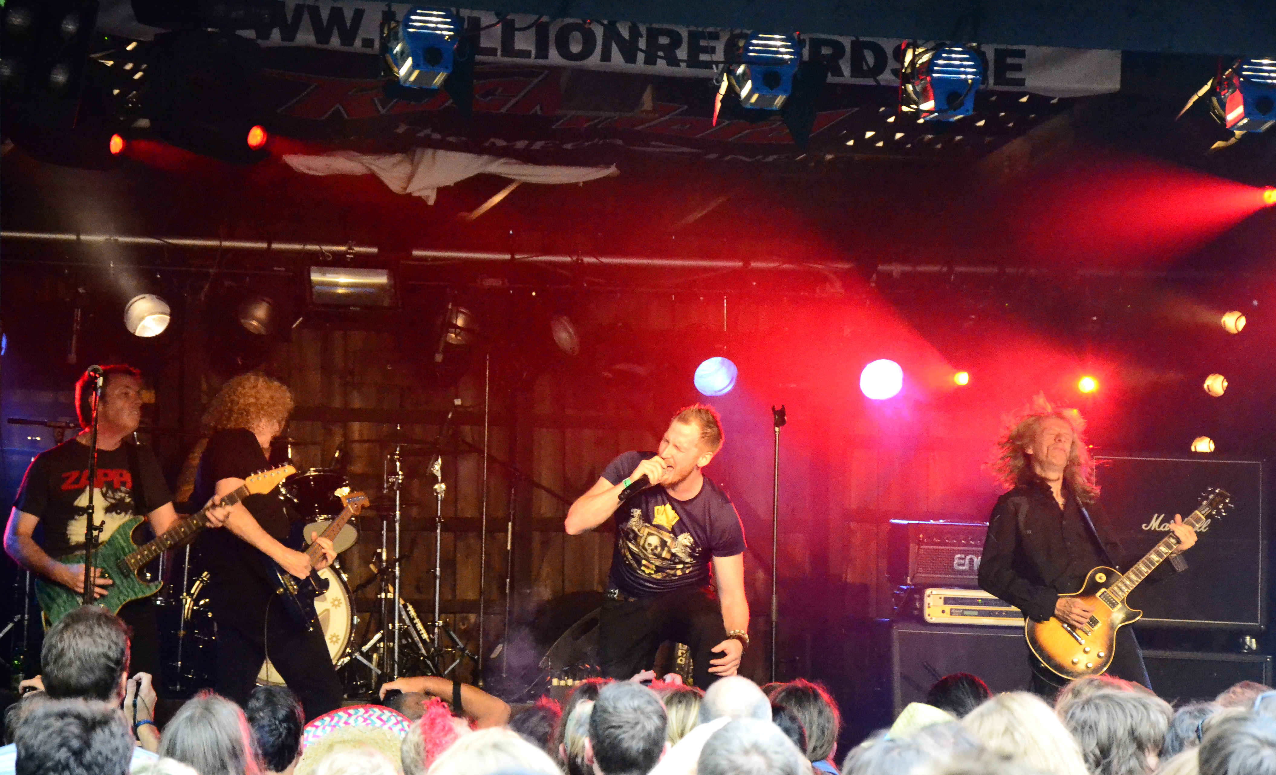 Diamond Head beim Headbangers Open Air 2014